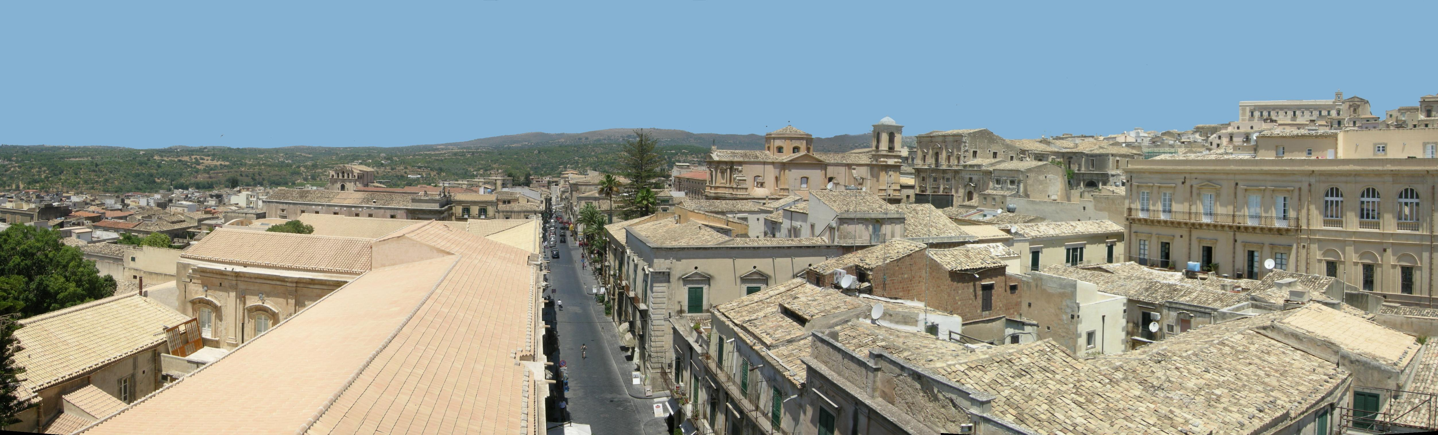 Noto, san carlo al corso, campanile, view